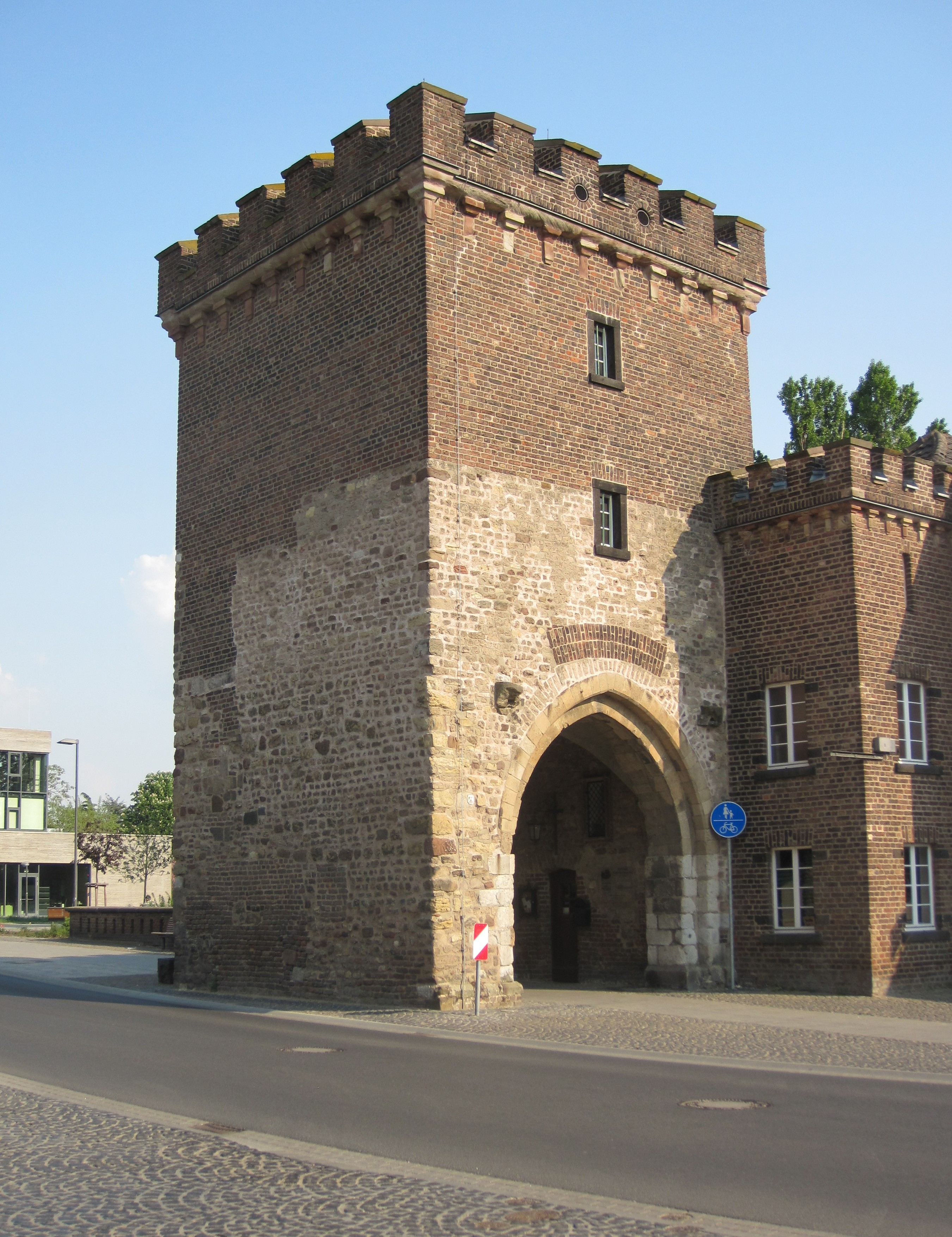 Lechenich Bonner Tor von Westen